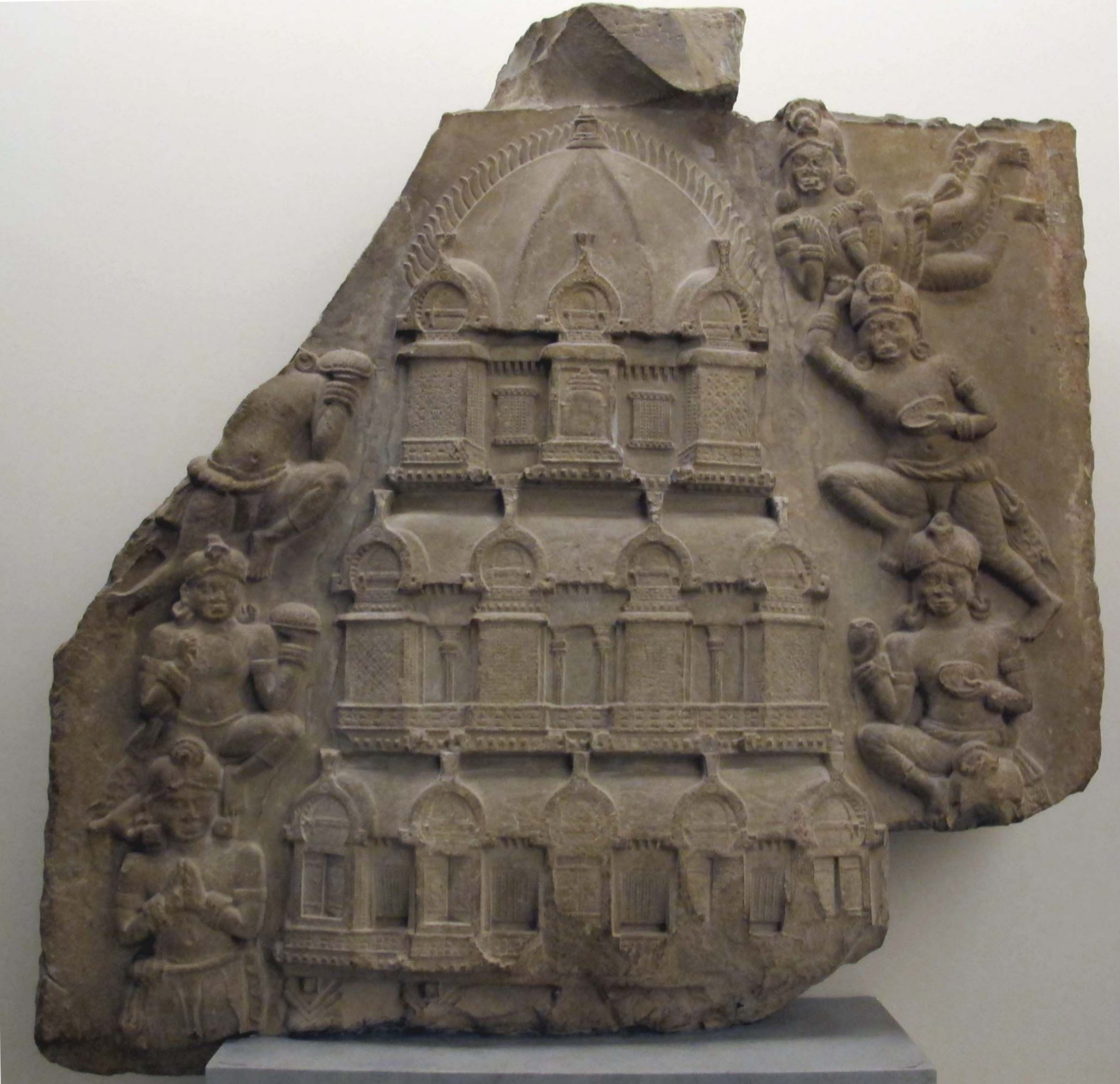 Santuario a più piani, da Ghantasala, Krishna district, Andhra Pradesh. 90-110 ca.